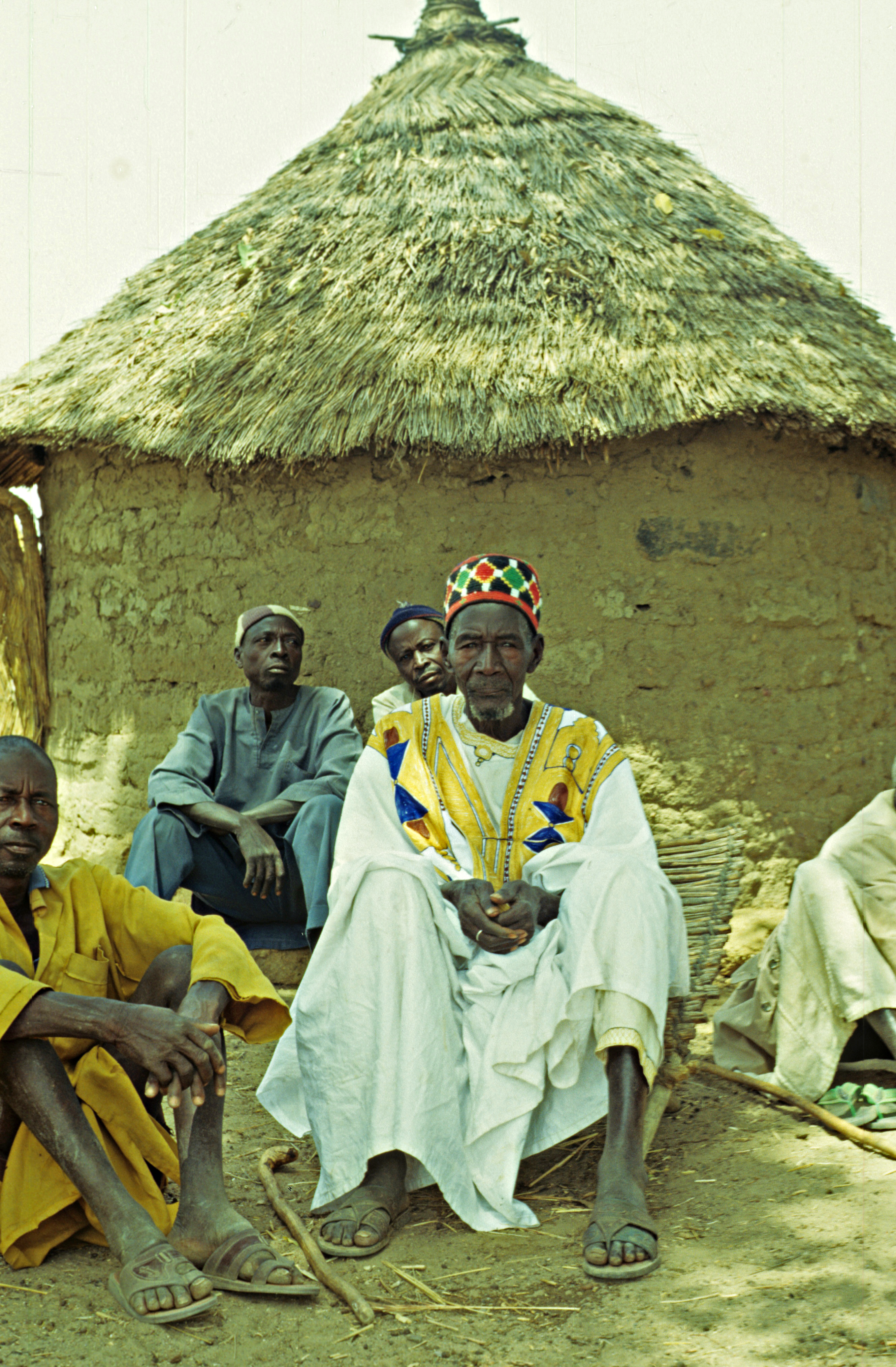 Dourtenga: Traditioneller Häuptling in einem zu Dourtenga gehörenden Dorf (der umstrittene Begriff Häuptling wird hier für das Oberhaupt eines Häuptlingstums benutzt, ein Begriff für den es bisher keine wirkliche Alternative gibt)